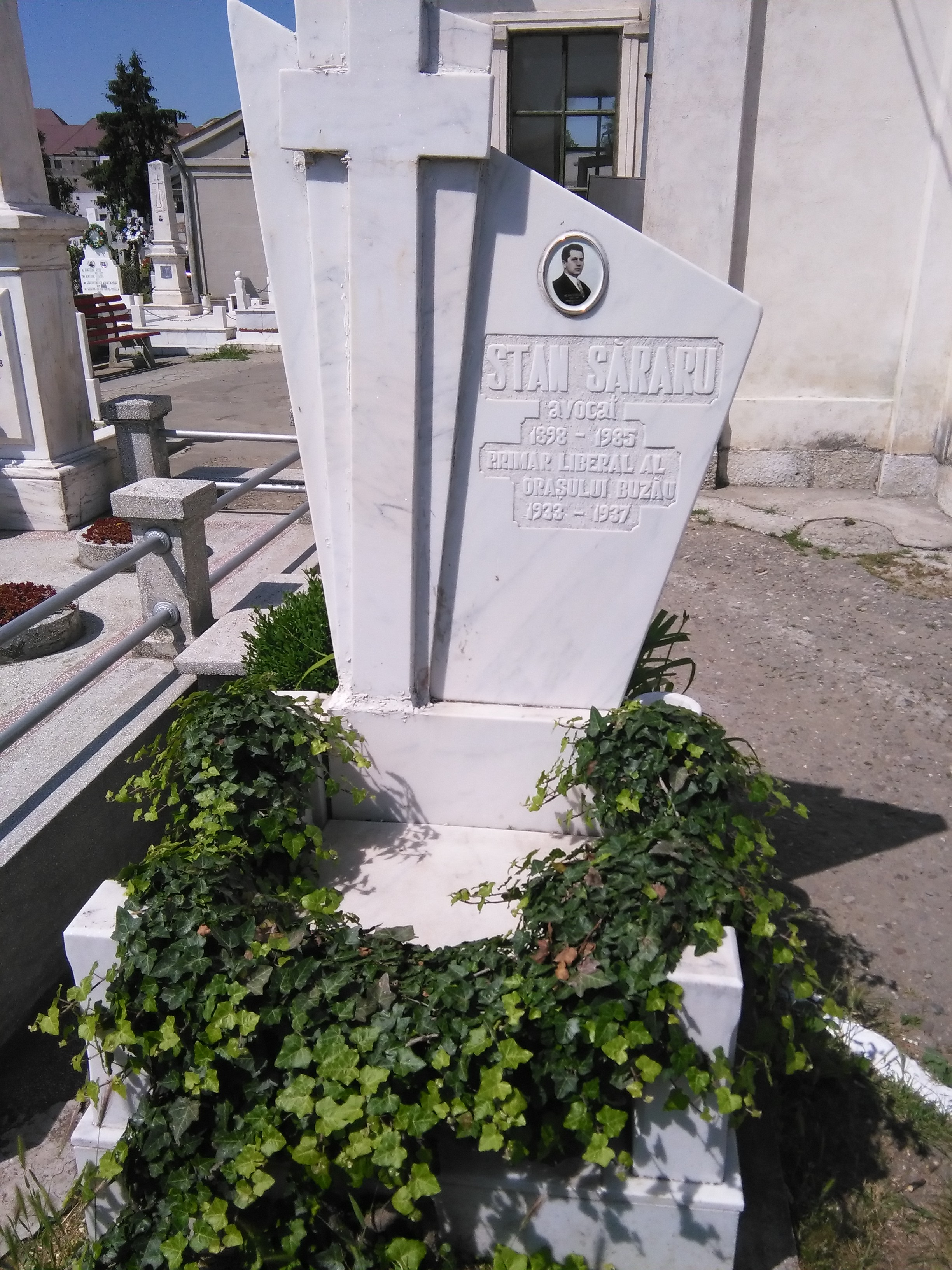 Monumentul funerar al domnului Stan Săraru politician român, membru al Partidului Național Liberal, primar al orașului Buzău, România, în perioada 1933-1937. Monumentul se află în cimitirul Dumbrava din orașul Buzău, la intrare, pe stânga, înnainte de capelă.